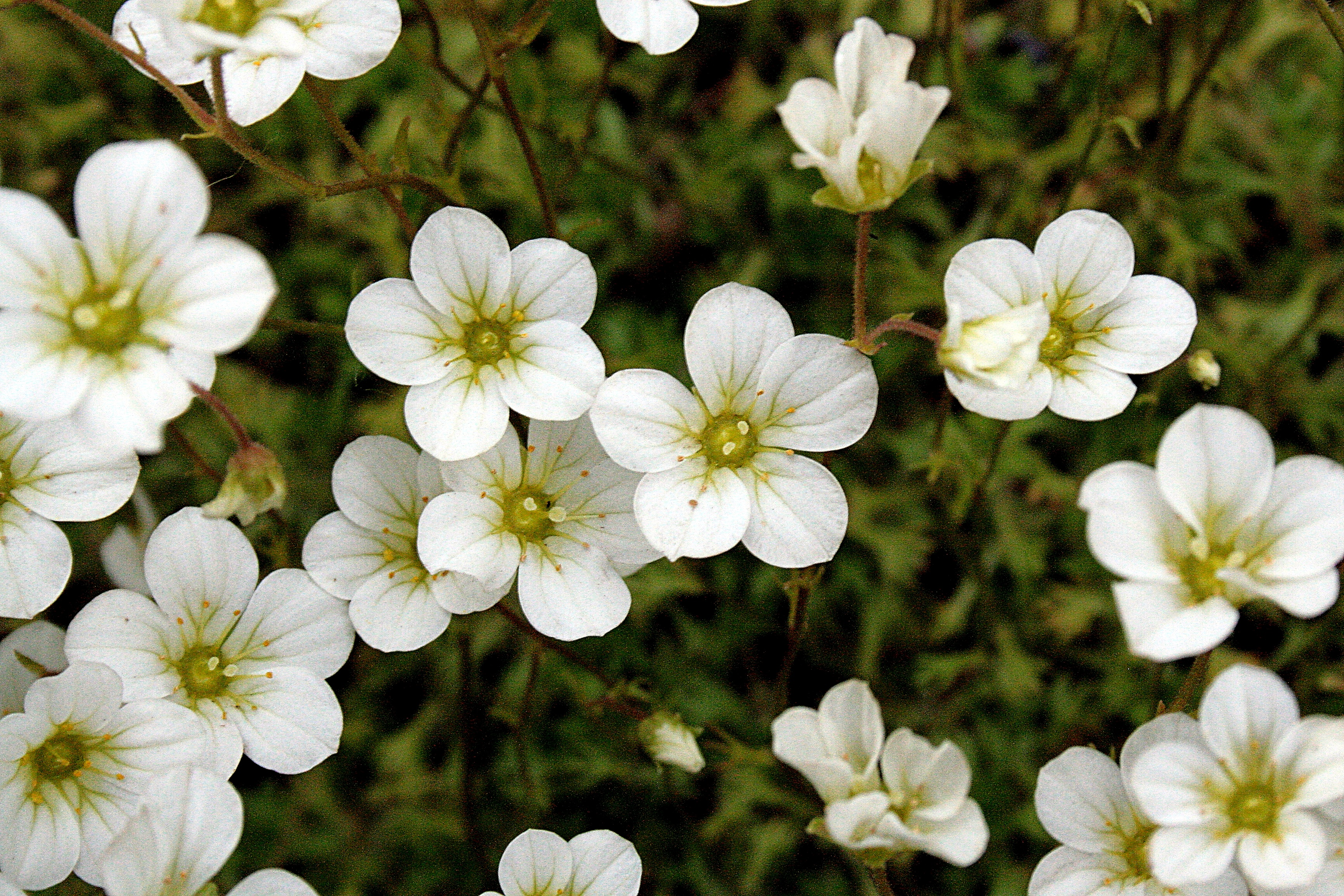 Ísland, Akureyri Botanical Gardens (Gartenecke 'Flora Islandica'): Rasen-Steinbrech_(Saxifraga_rosacea)